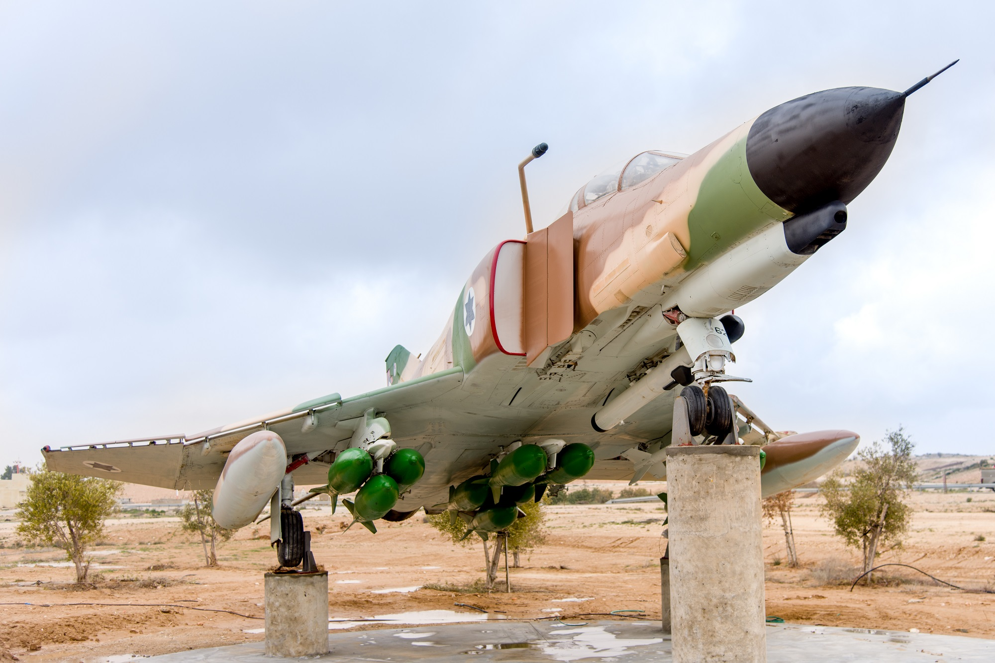 מטוס קורנס בטייסת 201